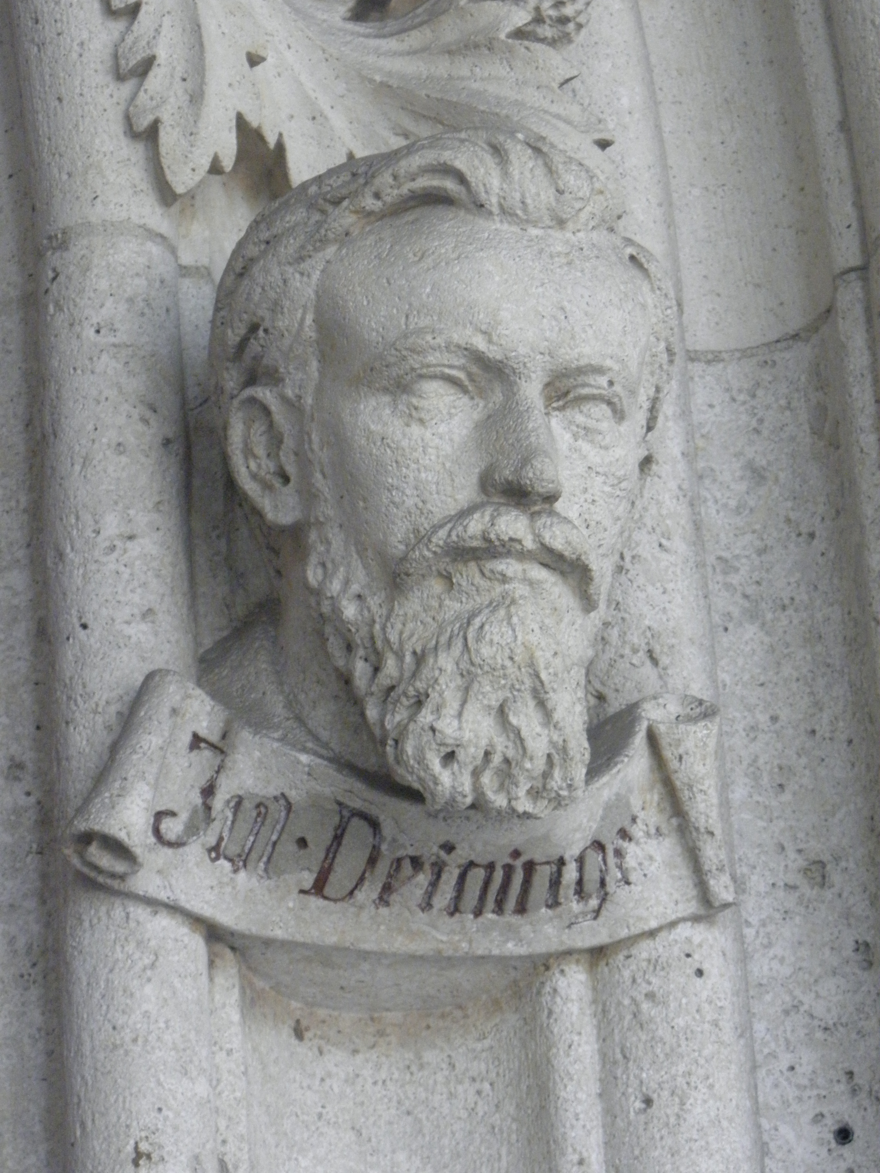 Büste von Julius Deininger an der Wand der Galerie des Wiener Rathauses. Julius Deininger (geboren am 30. Mai 1852 in Wien, gestorben 15. August 1924) war ein österreichischer Architekt.